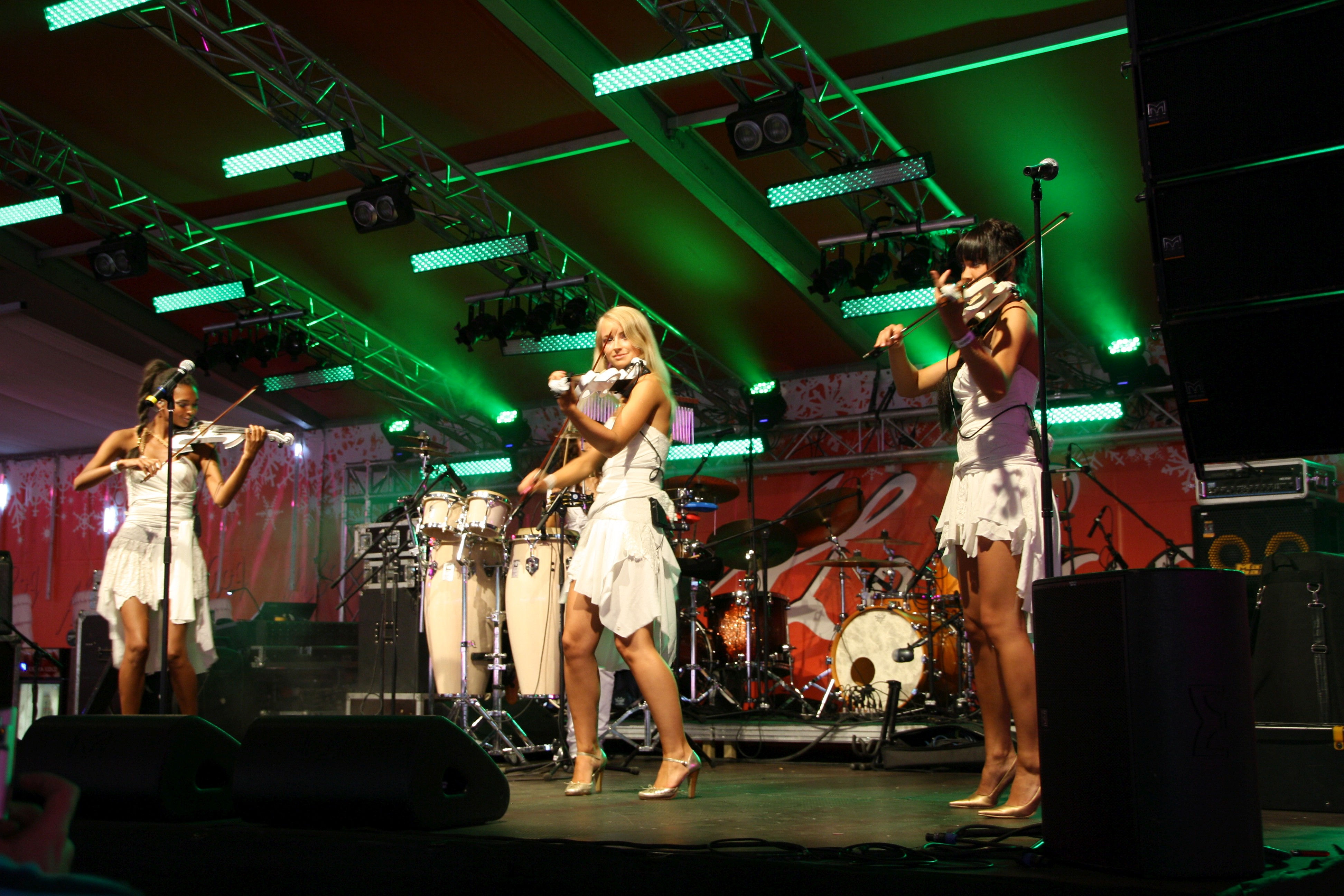 Violina esinemas Tallinna Lauluväljakul Õllesummeril